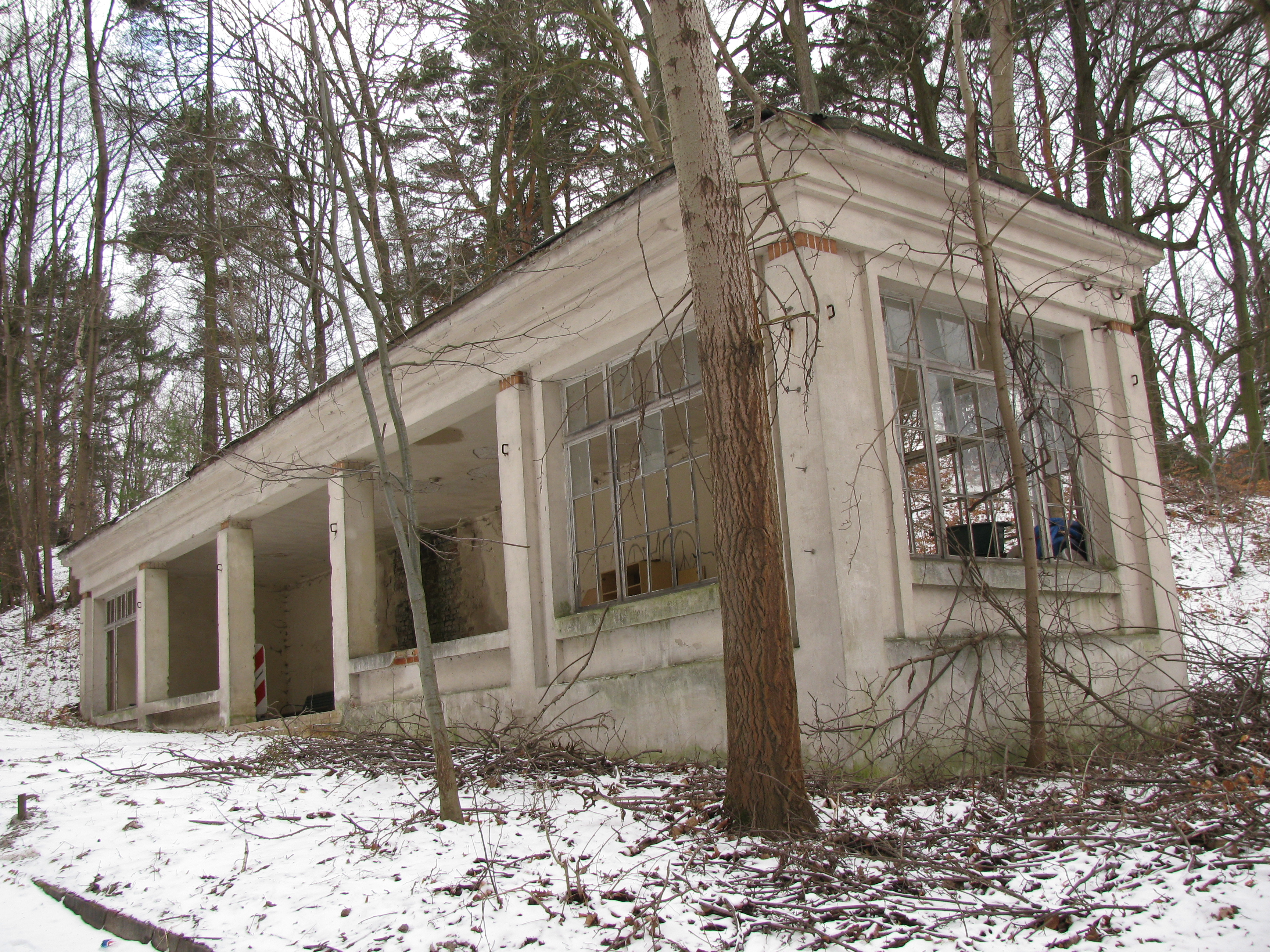 Gdańsk Oliwa. IV Dwór - pawilon ogrodowy.